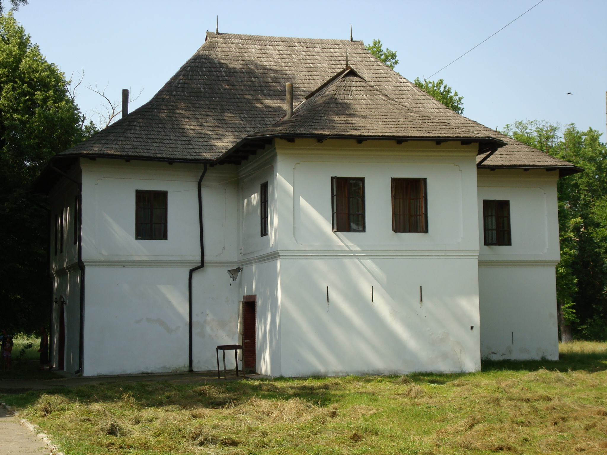 Casa Glogoveanu 01